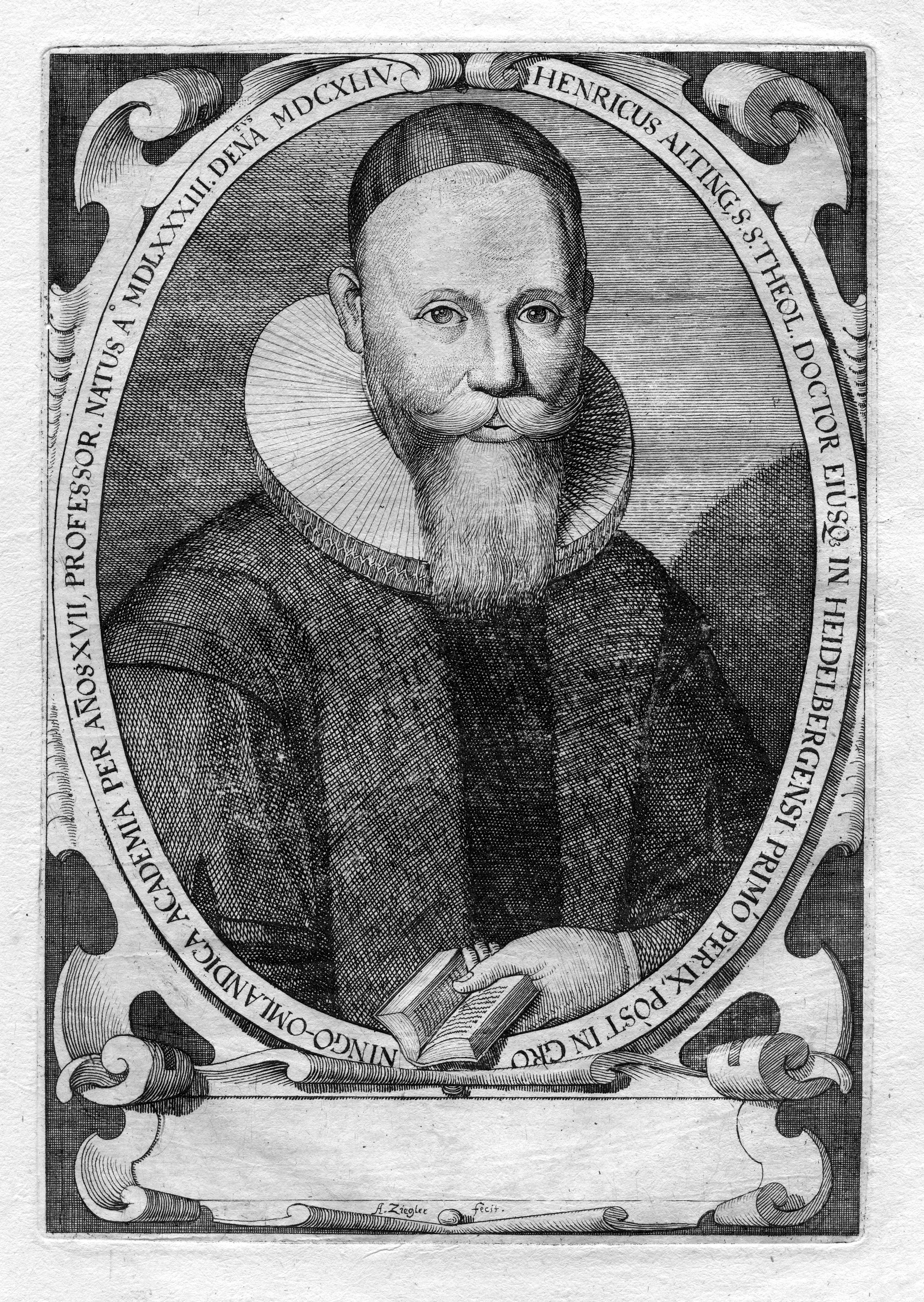 Portrait gravé